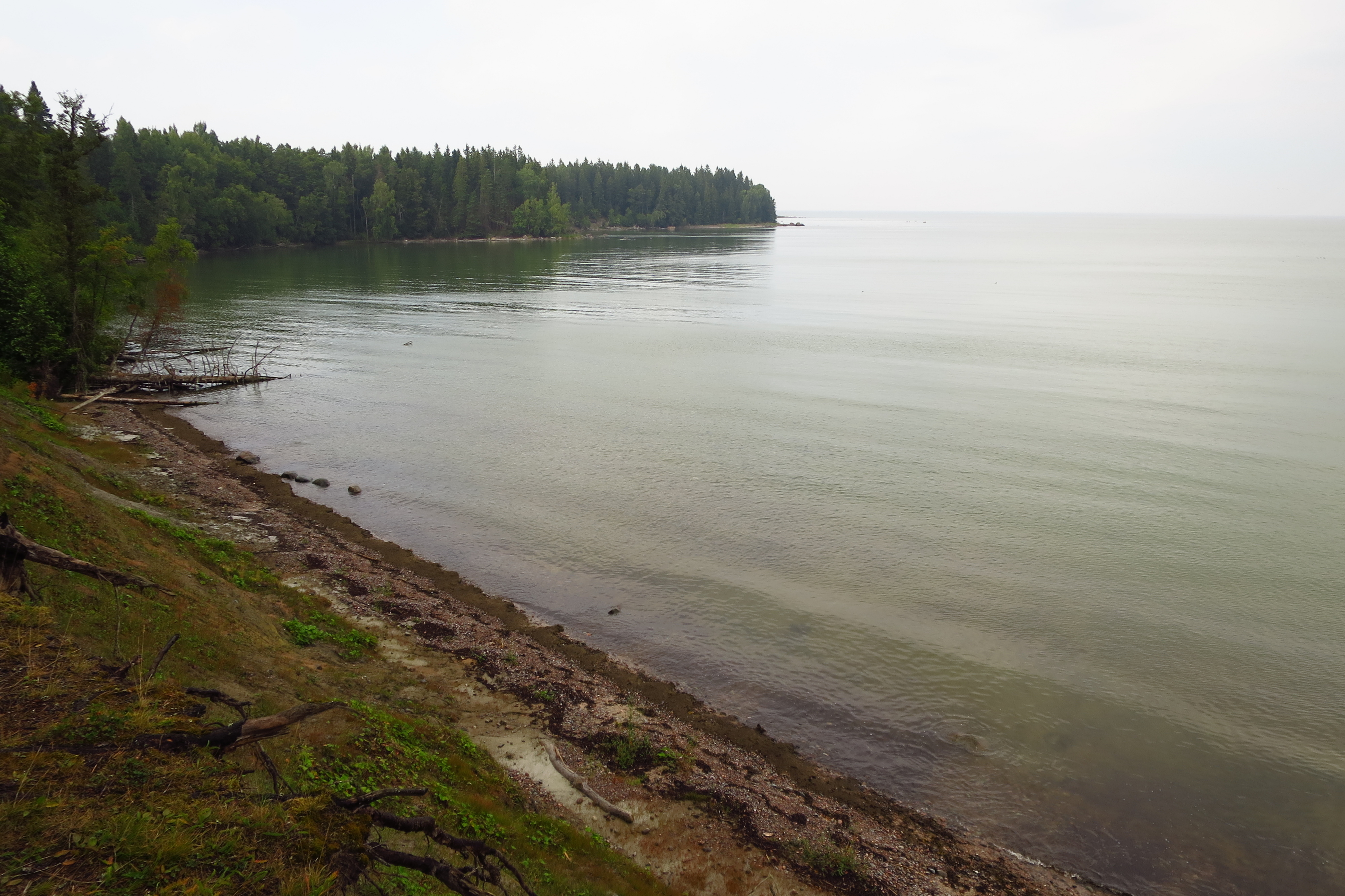 Naskali laht